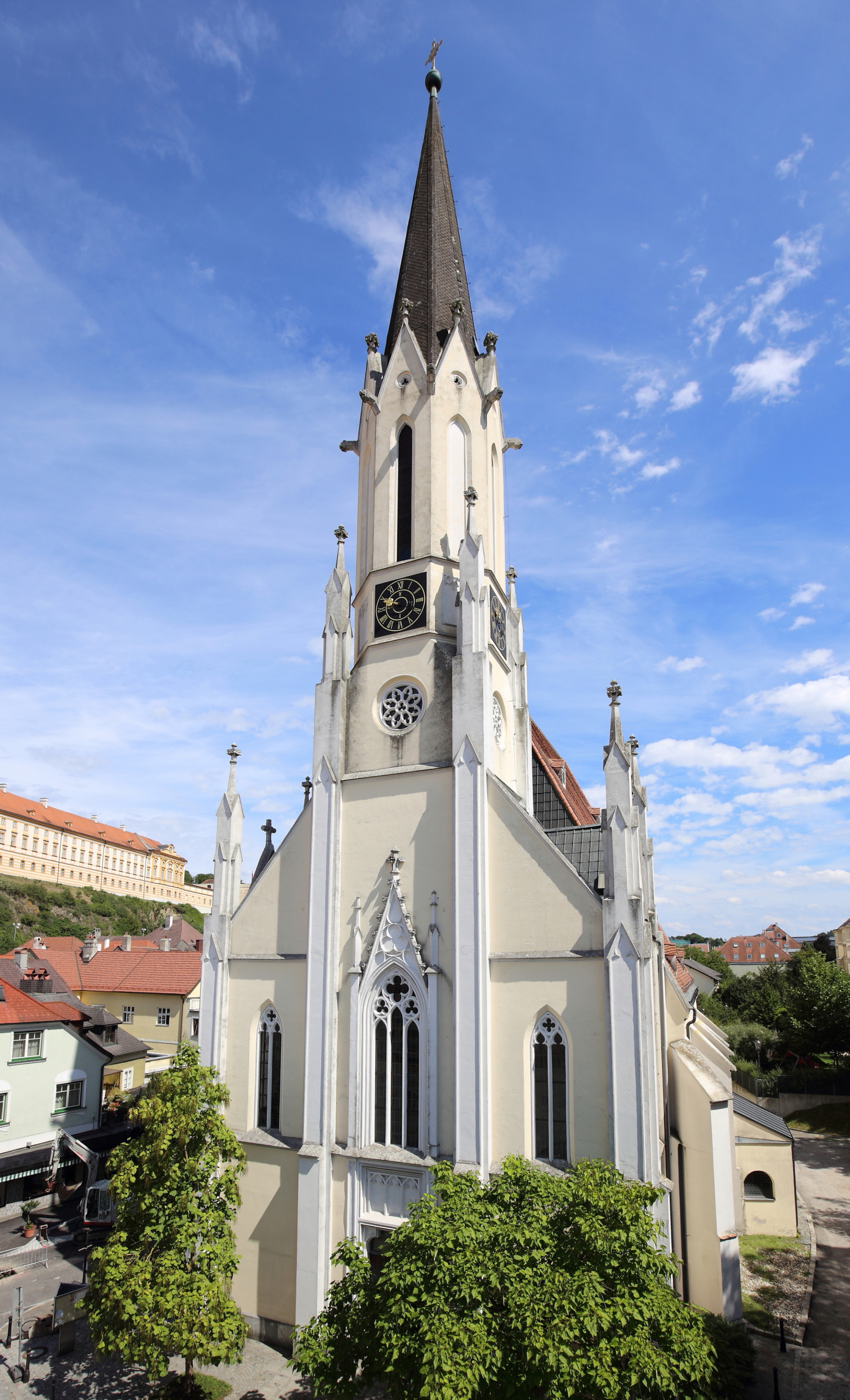 Katholische Pfarrkirche Mariae Himmelfahrt der niederösterreichischen Bezirkshauptstadt Melk. Eine spätgotische Kirche aus dem 15. Jahrhundert mit einem eingezogenen Chor. Nach dem Turmbrand 1847 wurde von 1868 bis 1877 der Turm und ein dreiachsiger, dreizoniger Turmvorbau neu errichtet.